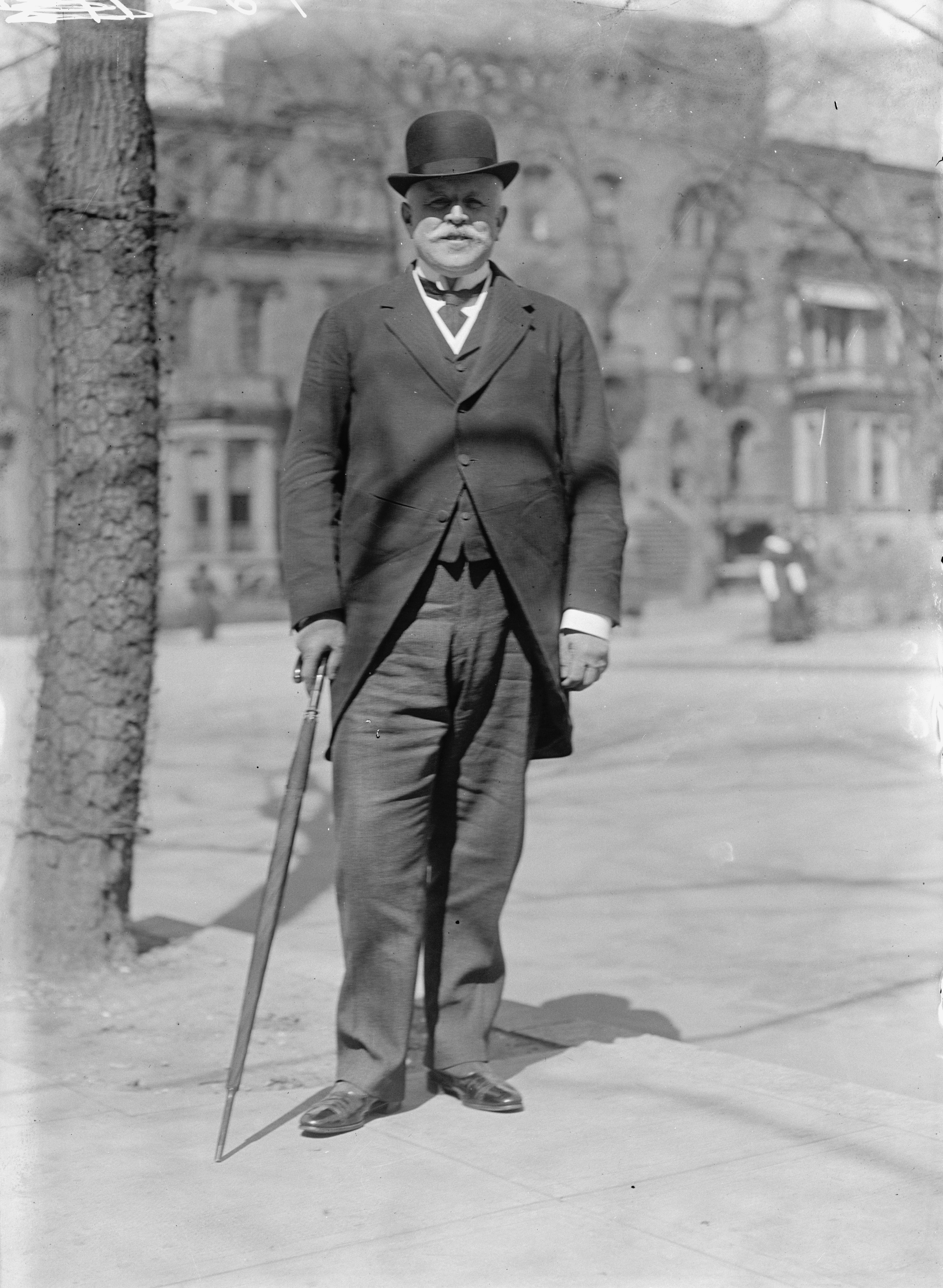 Depicted person: Gilberto Crespo y Martínez